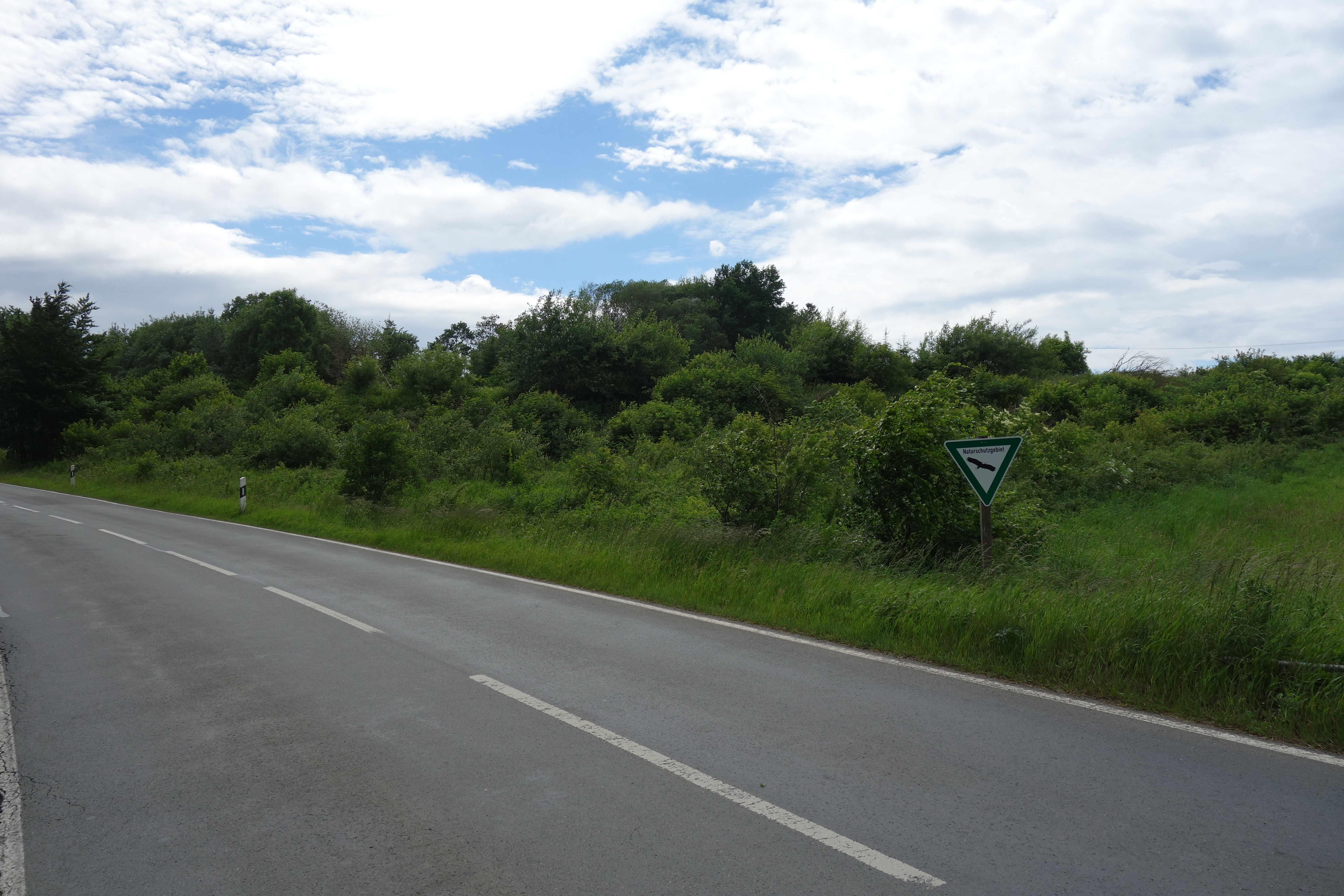 Naturschutzgebiet Fledermausstollen am Thülener Stein von der K 60 aus südöstlicher Richtung gesehen.